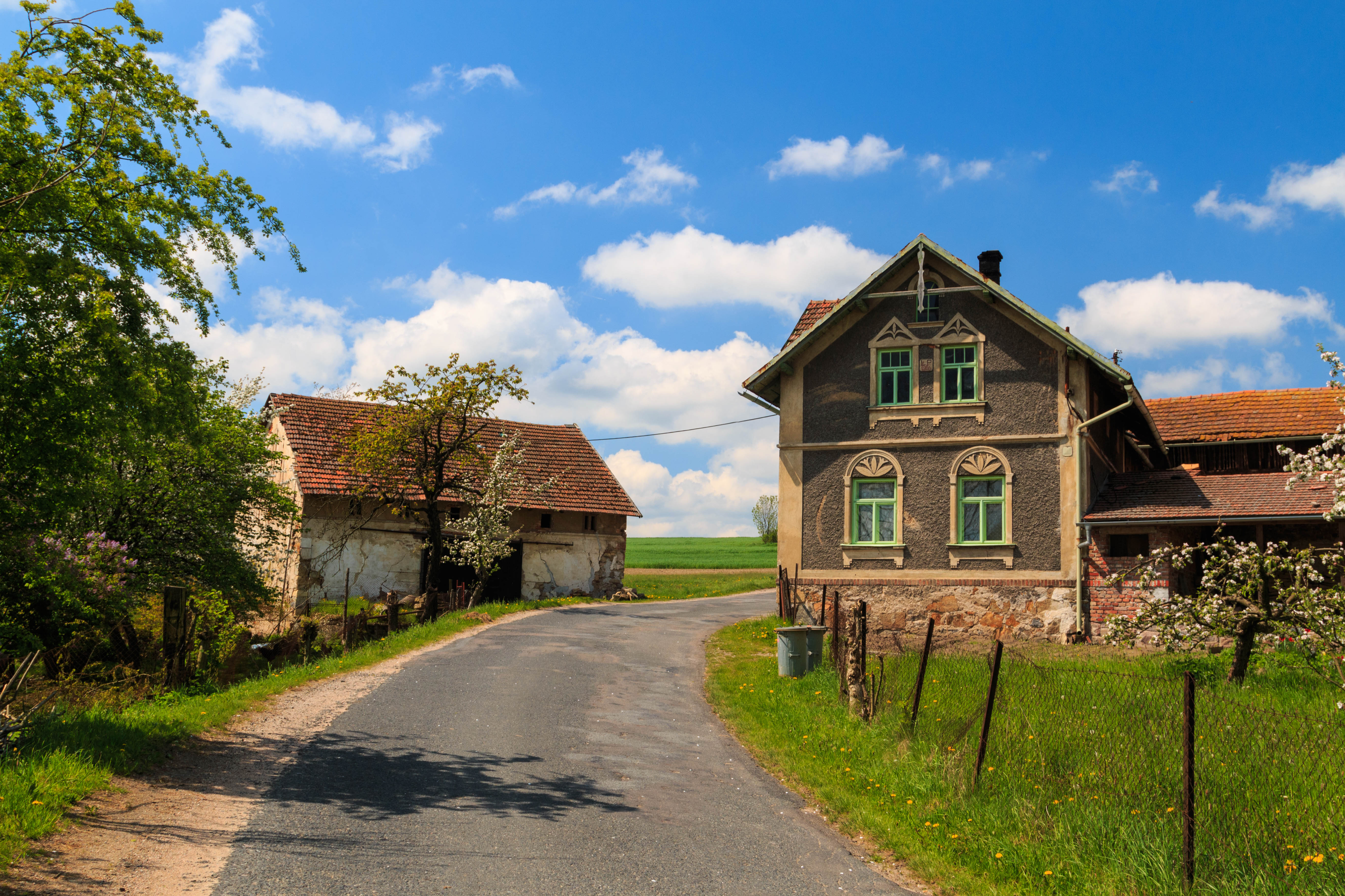 Miřetín čp. 38